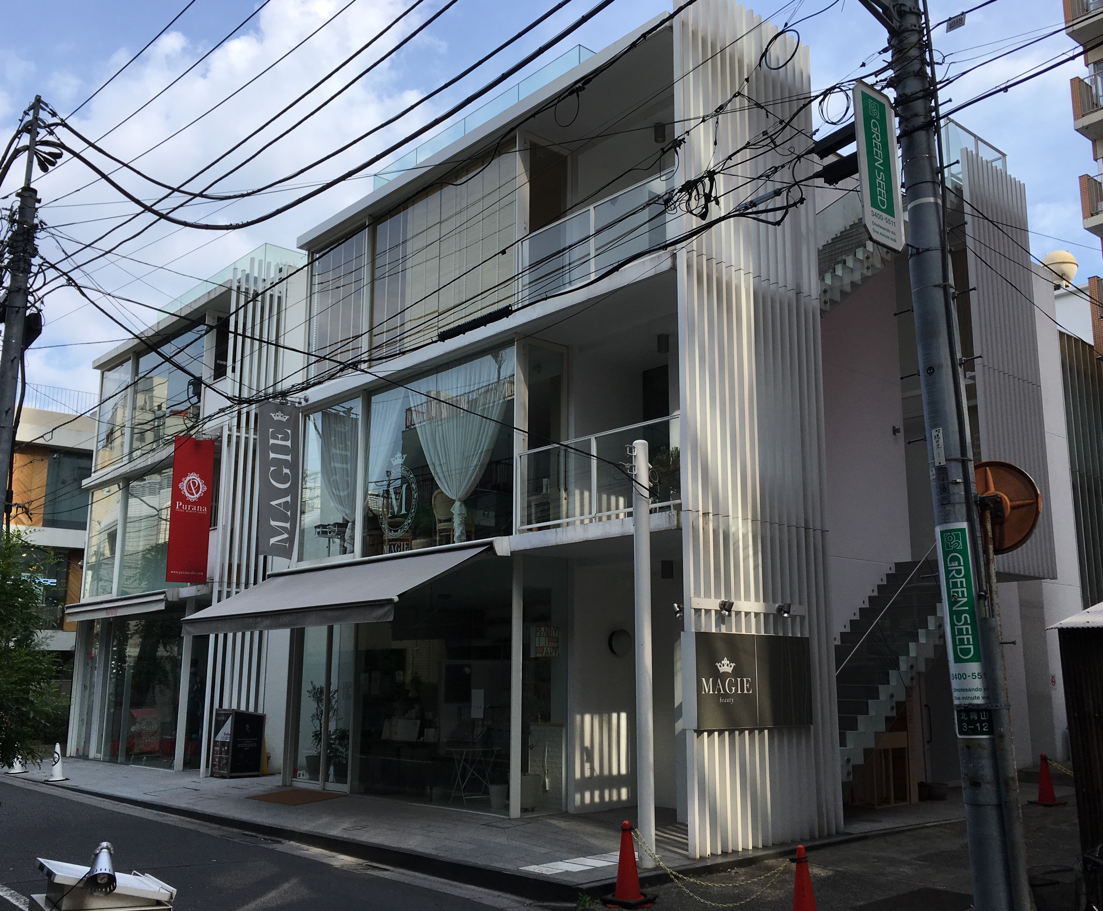 團紀彦設計の南青山にある建築、HOLON L/R。